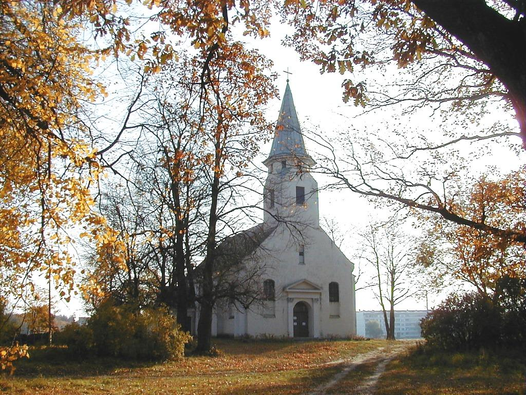 Jaunolaines baznīca 2000-10-06